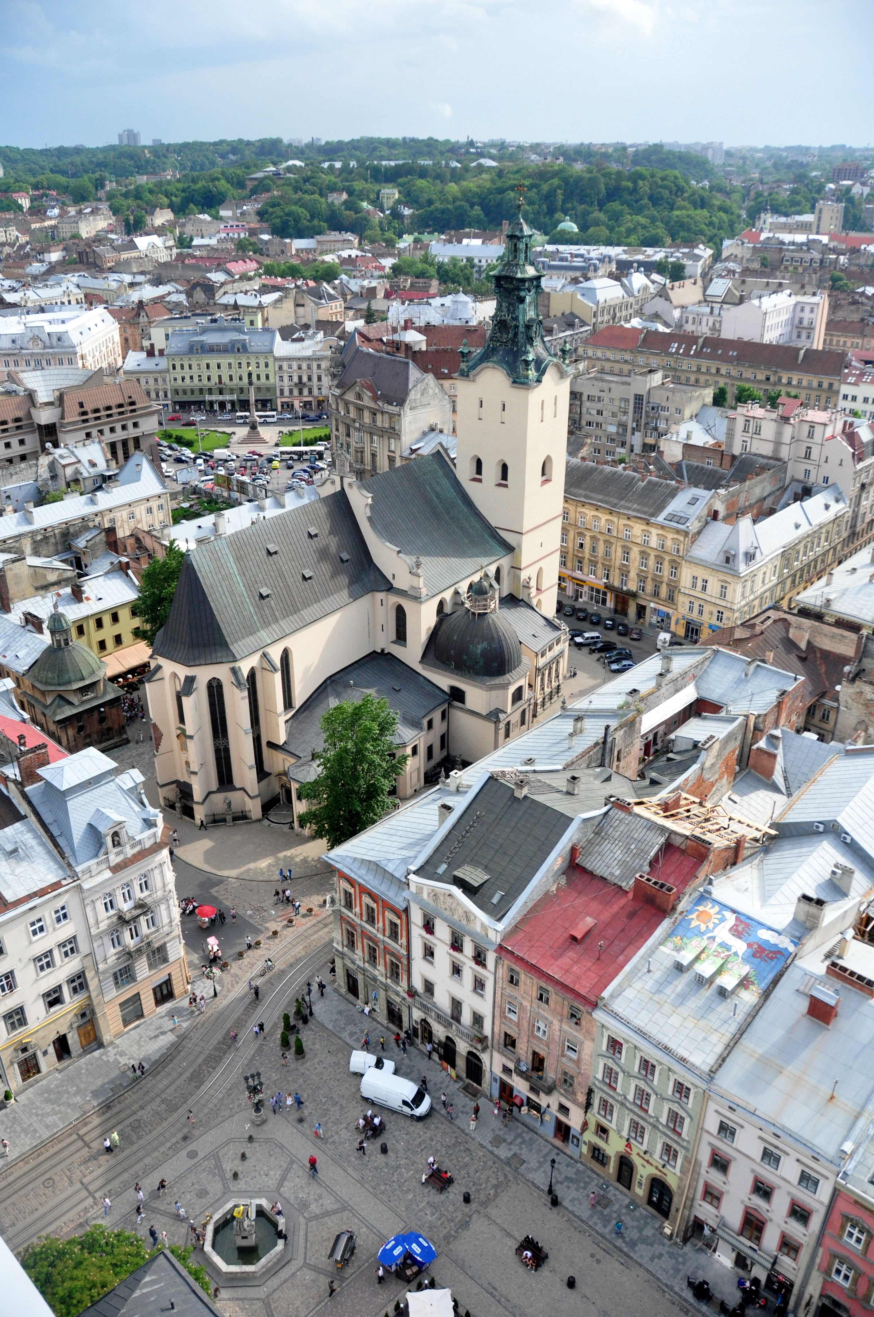 Римо-католицький кафедральний собор Успення Пресвятої Діви Марії. Вигляд на прилеглий квартал з вежі Ратуші.